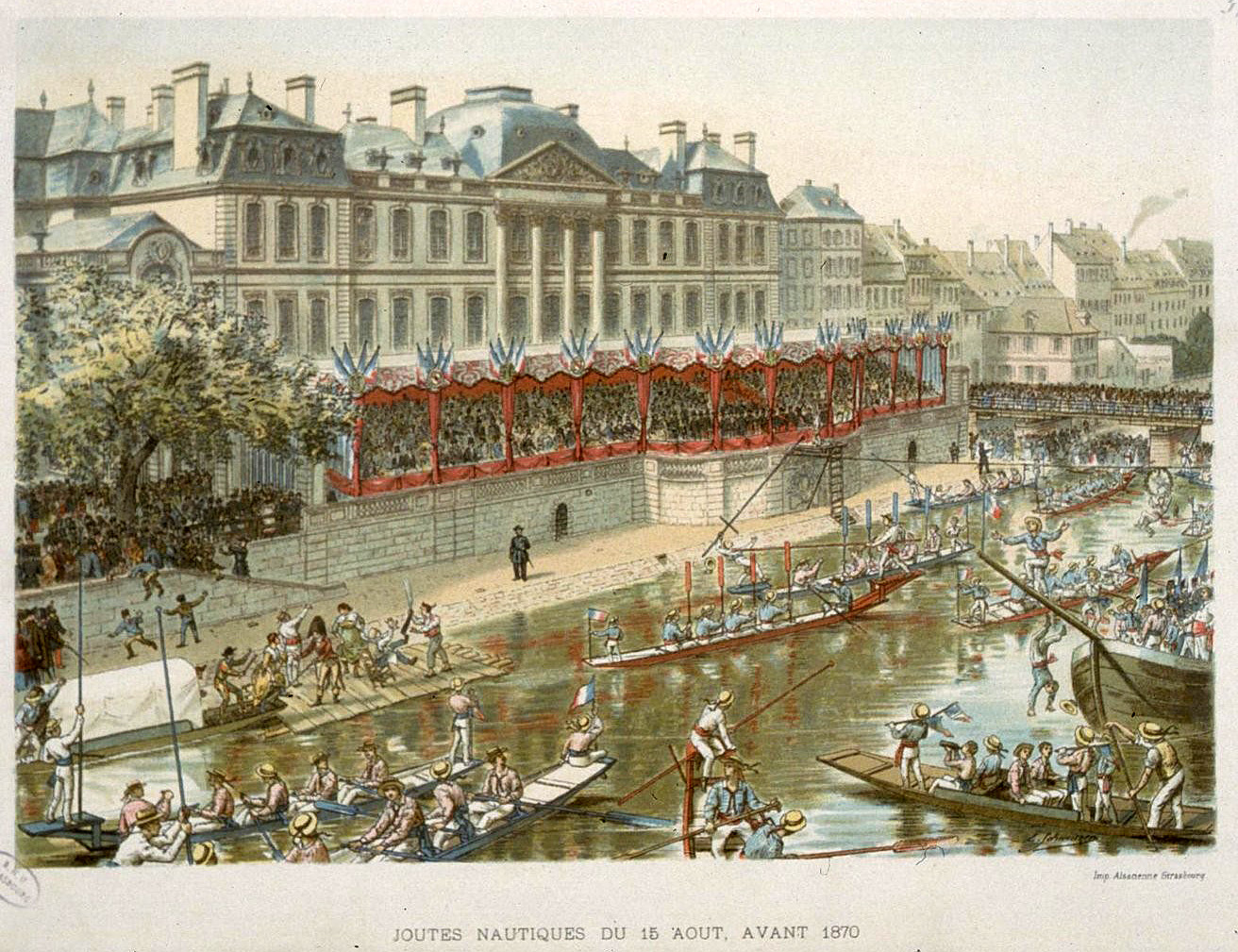 Joutes nautiques du 15 Août. Avant 1870. Bibliothèque nationale et universitaire de Strasbourg